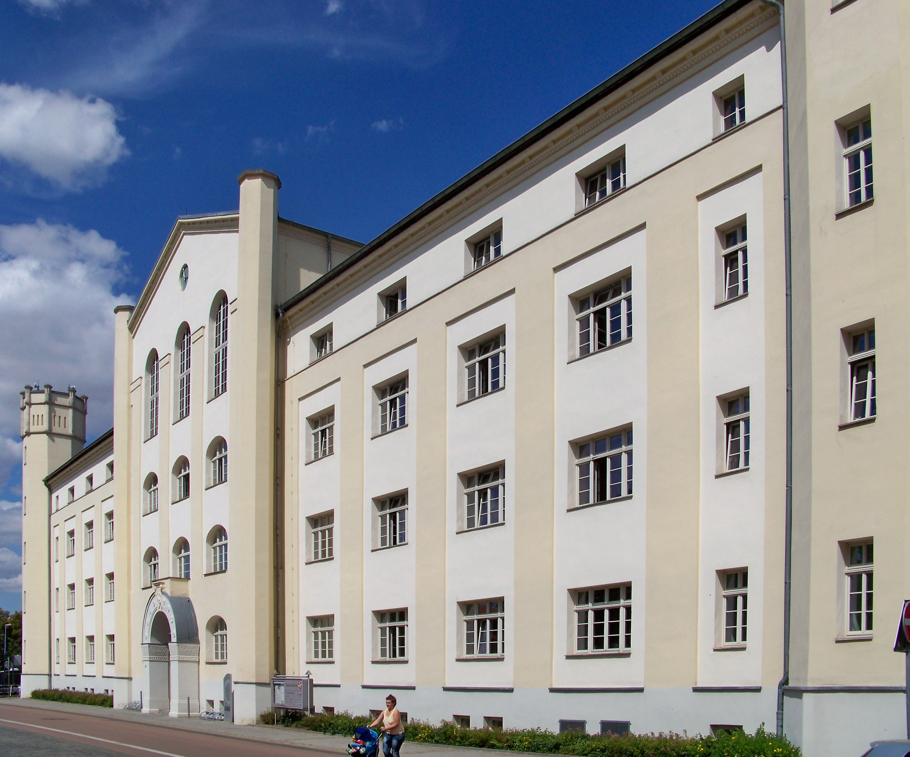 Landratsamt des Salzlandkreises in Bernburg (Saale)